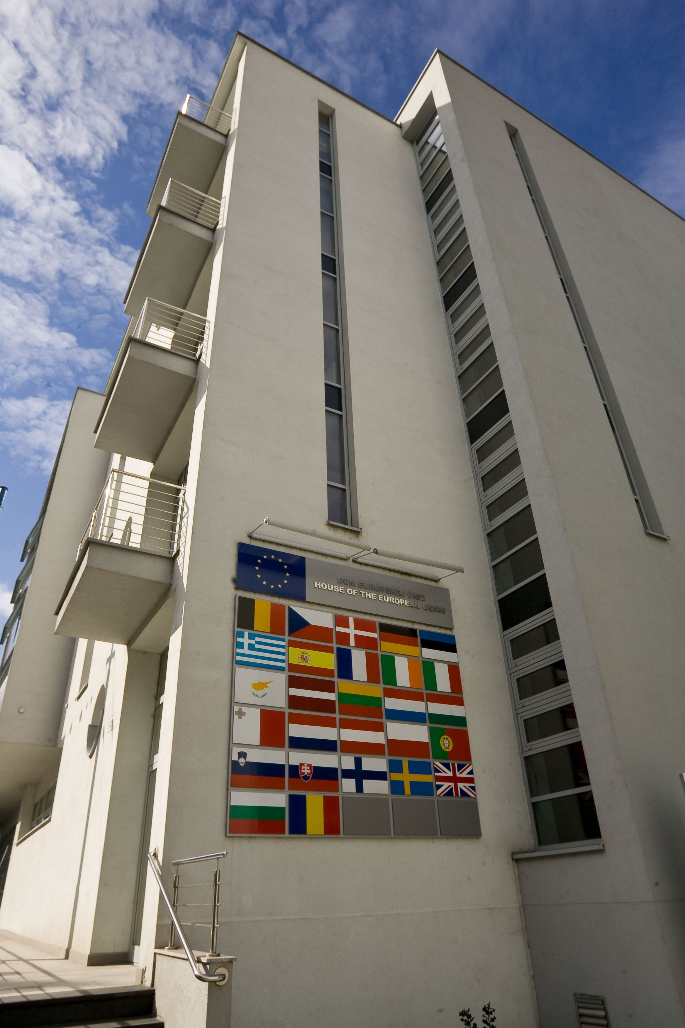 Dom Európskej únie, foto: EK